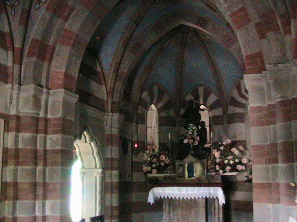 BERCETO - Passo della Cisa - Santuario di Nostra Signora della Guardia